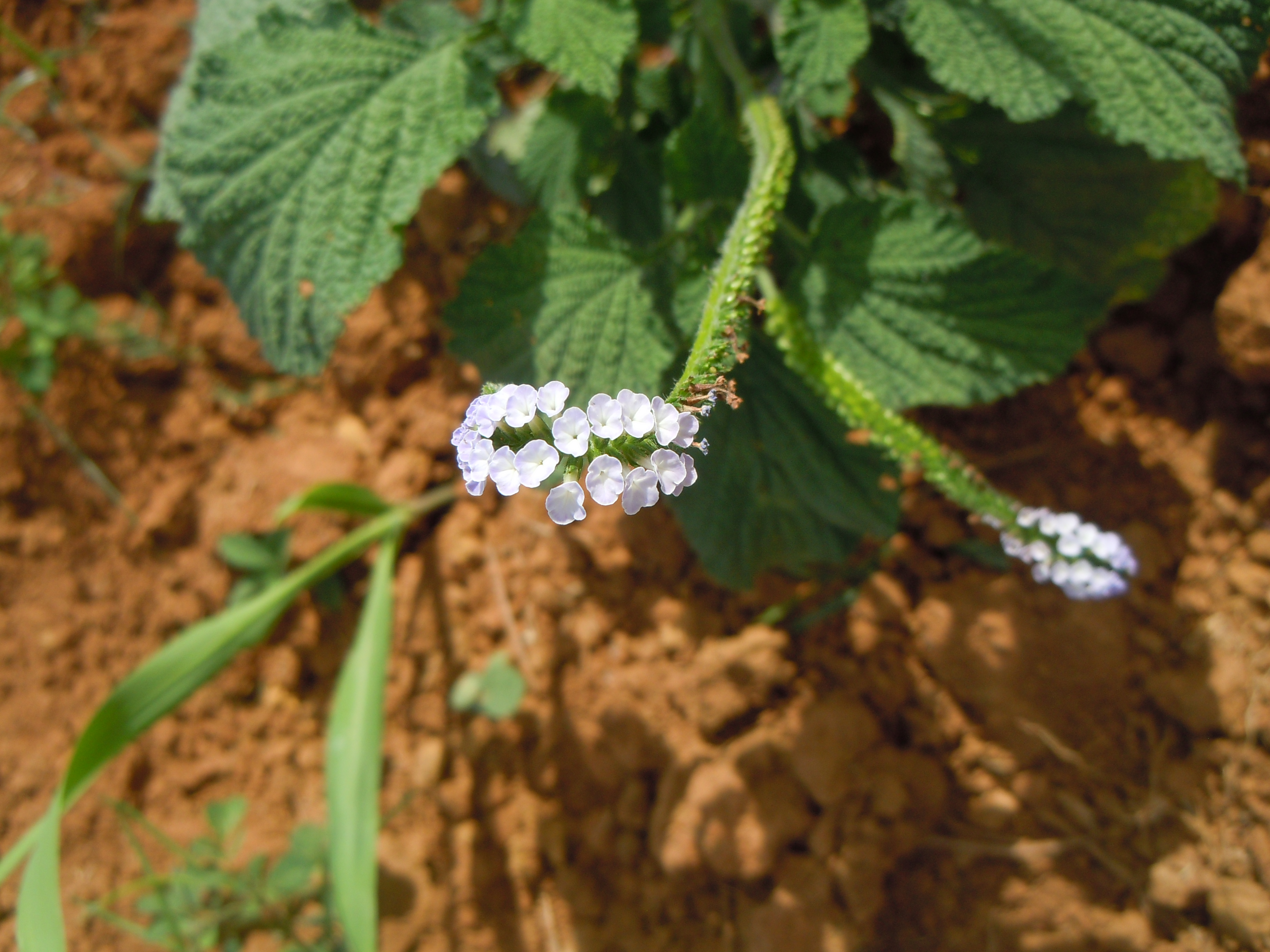 Heliotropium indicum - Vinales (Cuba) - inflorescence Inflorescence